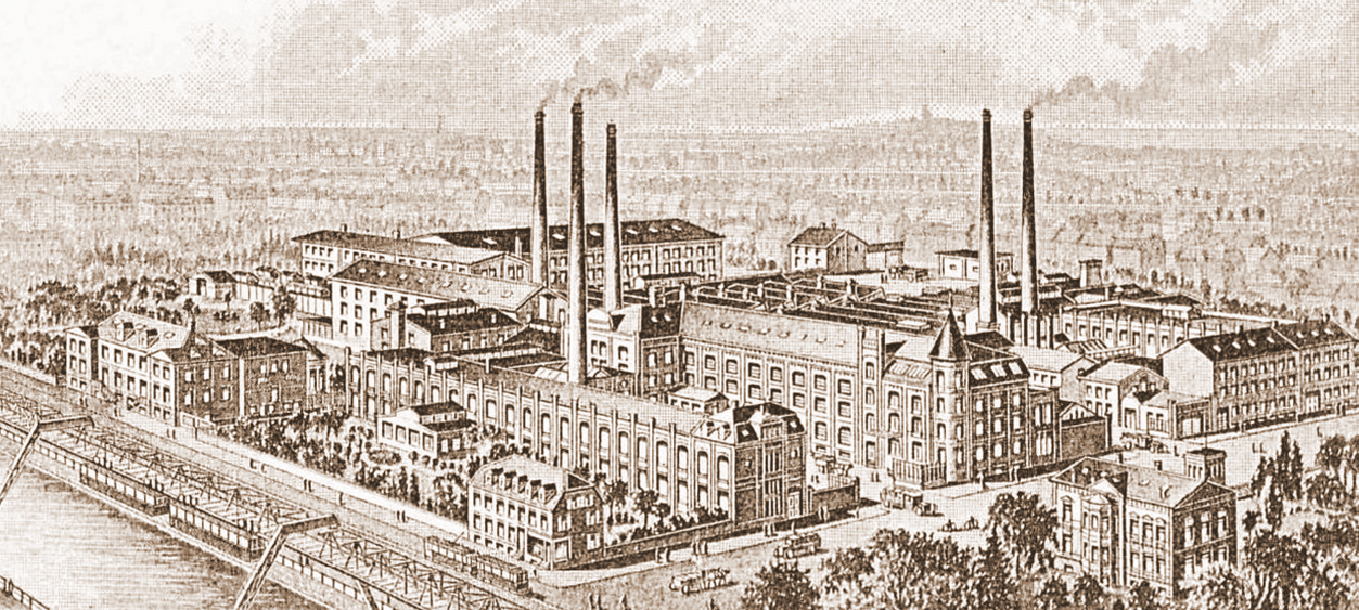 Fabrikanlage der Firma Julius und August Erbslöh in Barmen-Wupperfeld (heute zu Wuppertal), um 1900